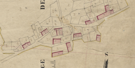 Bena en el Cadastre Napoleònic del 1812 (Arxius Departamentals dels Pirineus Catalans)